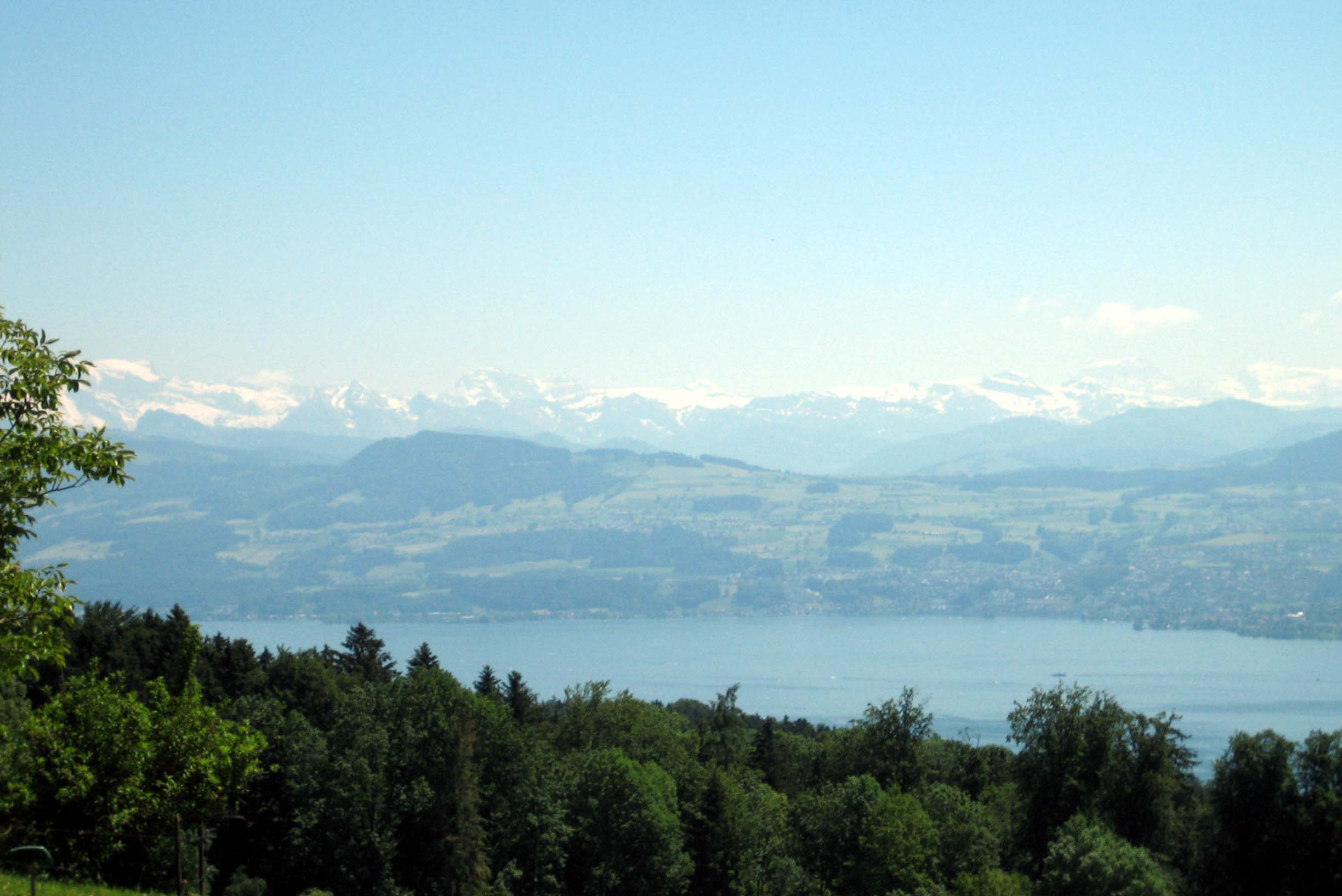 Blick über den Zürichsee nach Süden